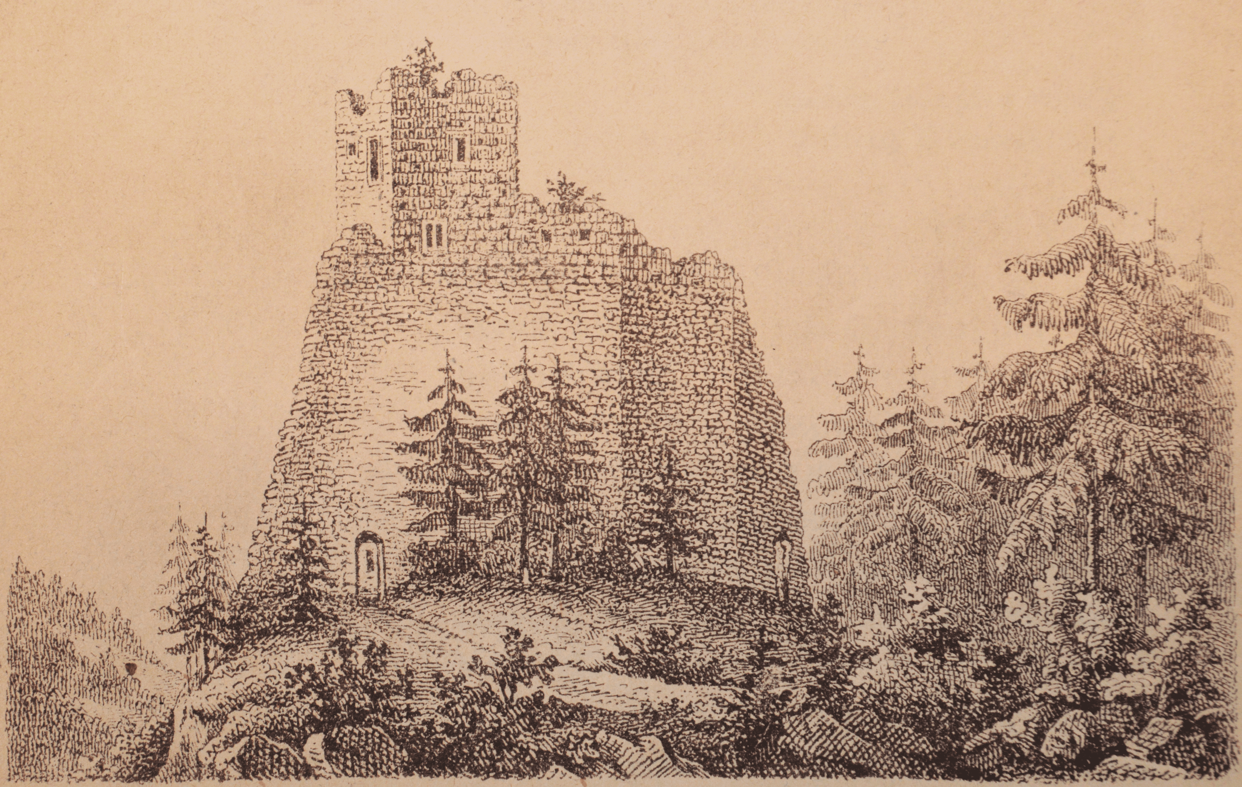 Die Zeichnung stammt von der Titelseite des Buches: "Hie hebt an das Buechlin der Herren von Ramswage". Das Buch wurde 1871 publiziert, die Zeichnung kann also nicht neueren Datums sein. Der Urheber der Zeichnung wird in der Publikation nirgendwo erwähnt. Auch über Bibliotheks- und Archivkatalogie sowie über Websuchmaschinen lässt sich der Urheber nicht zweifelsfrei ermitteln.